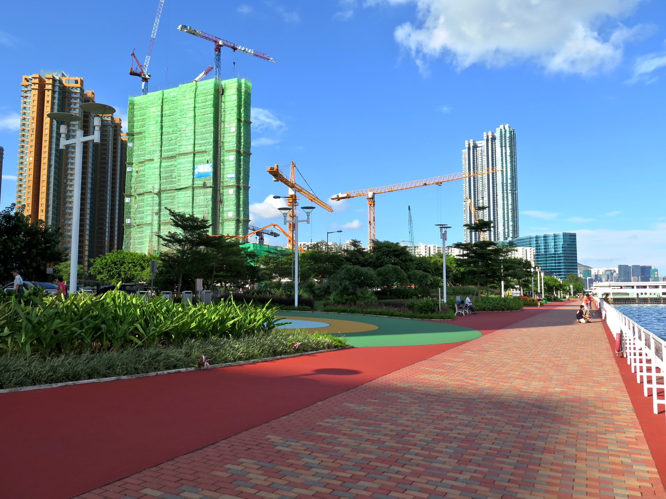 Hung Hum Promenade